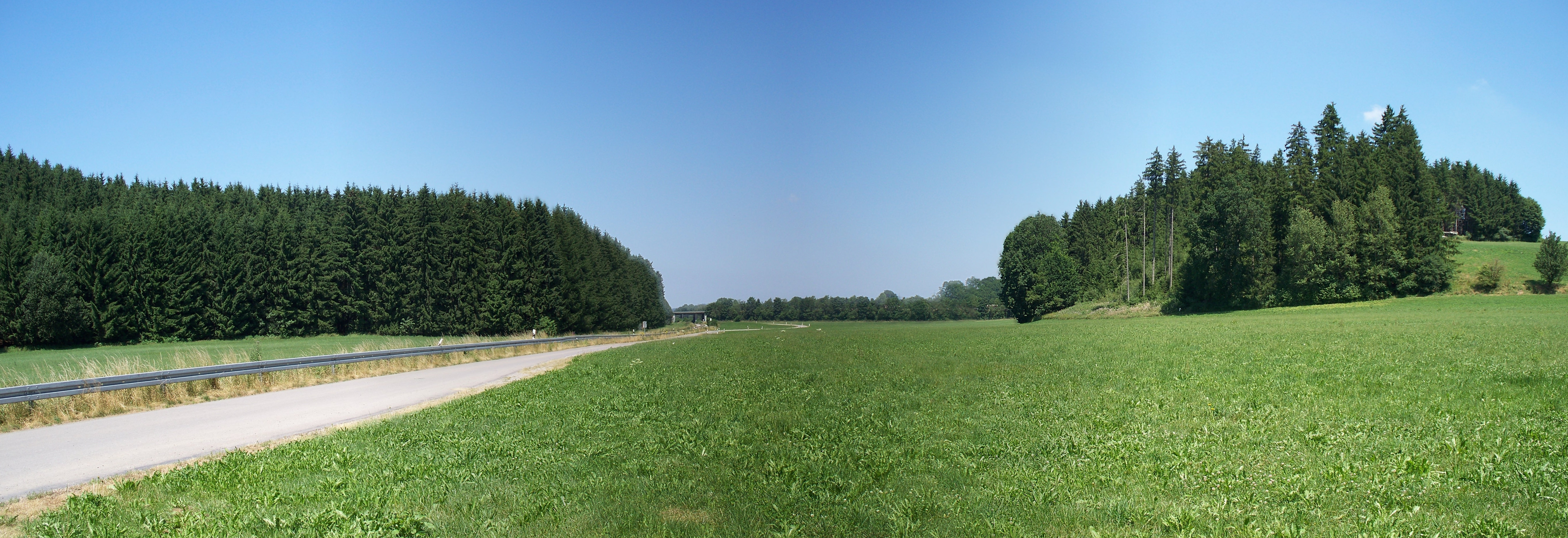 Trompetentälchen bei Schwenden, Bad Grönenbach, Landkreis Unterallgäu. Erfasst als Geotop "Ziegelberger Trompetentälchen", Geotop Nr. 778R003. Während der Rückzugsphase des Gletschers entsteht zwischen Eisrand und Endmoräne ein Stausee, der zu gegebener Zeit an der tiefsten Endmoränenstelle überläuft. Die Wassermassen schneiden sich aufgrund des hohen Gefälles tief in den Endmoränenabschnitt ein. Das Foto zeigt das Tälchen in Blickrichtung Norden, d.h. in die Richtung, in die das Wasser am Ende der letzten alpinen Eiszeit (Würm) abfloss. Dieses Trompetentälchen ist eine große Rarität, weil es im Urzustand (bis auf omnipräsente Verwitterung) konserviert wurde, da die entstehende "Iller" bereits kurz nach dem Durchbruch ihr neues Flussbett fand.